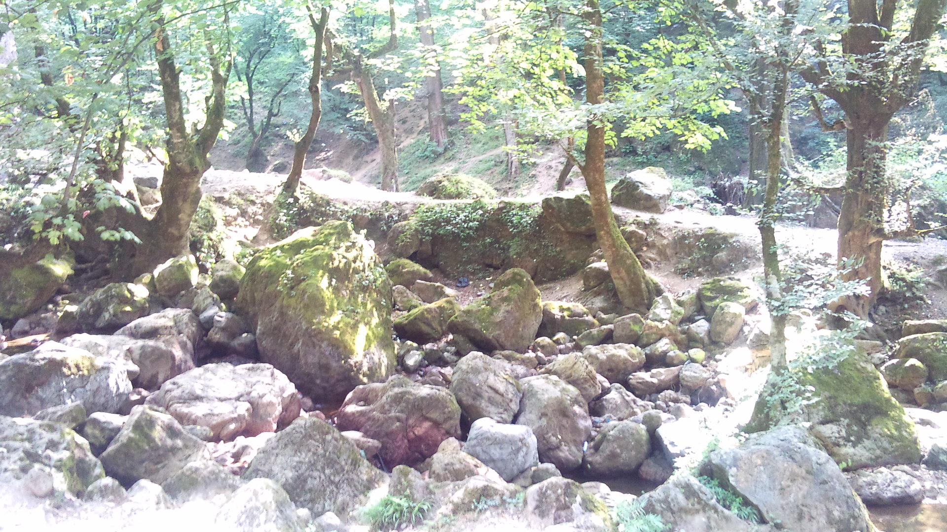 جنگل گیلان